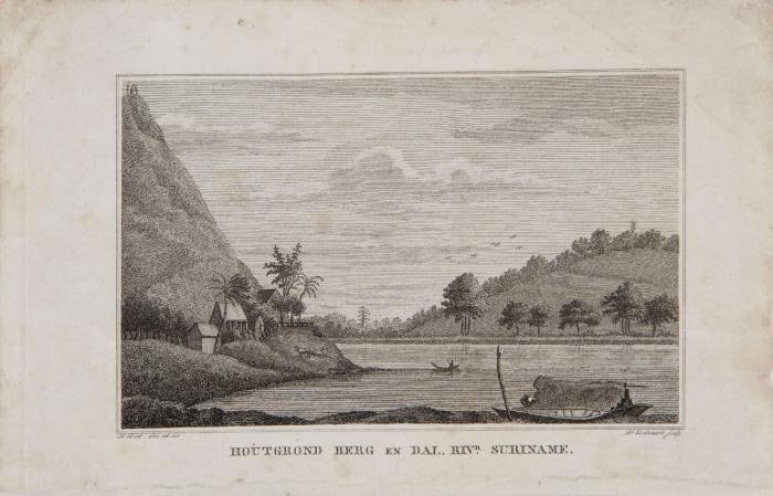 Gravure. Gravure van de houtgrond Berg en Dal aan de Surinamerivier. Berg en Dal, of Bergendaal was een grensplantage, en als zodanig kwetsbaar voor aanvallen van marrons. Marrons, voormalige slaven die hadden weten te vluchten naar het moeilijk toegankelijke binnenland, overvielen geregeld plantages voor goederen. Vaak sloten plantageslaven zich dan bij hen aan, en vluchtten mee. Behalve een houtgrond, was Berg en Dal (of Berg-en-Daal, in Sranan Tongo Bergi genoemd) ook een vestigingsplaats van de Moravische zending en hoofdstation van de goudzoekers. Ten tijde van de afschaffing van de slavernij, Emancipatie, op 1 juli 1863, werkten er 318 slaven. De houtgrond ligt tussen de houtgrond Karelswoud en de Polloniekreek.. Gravure van de houtgrond Berg en Dal aan de Suriname-rivier, naar N. Box